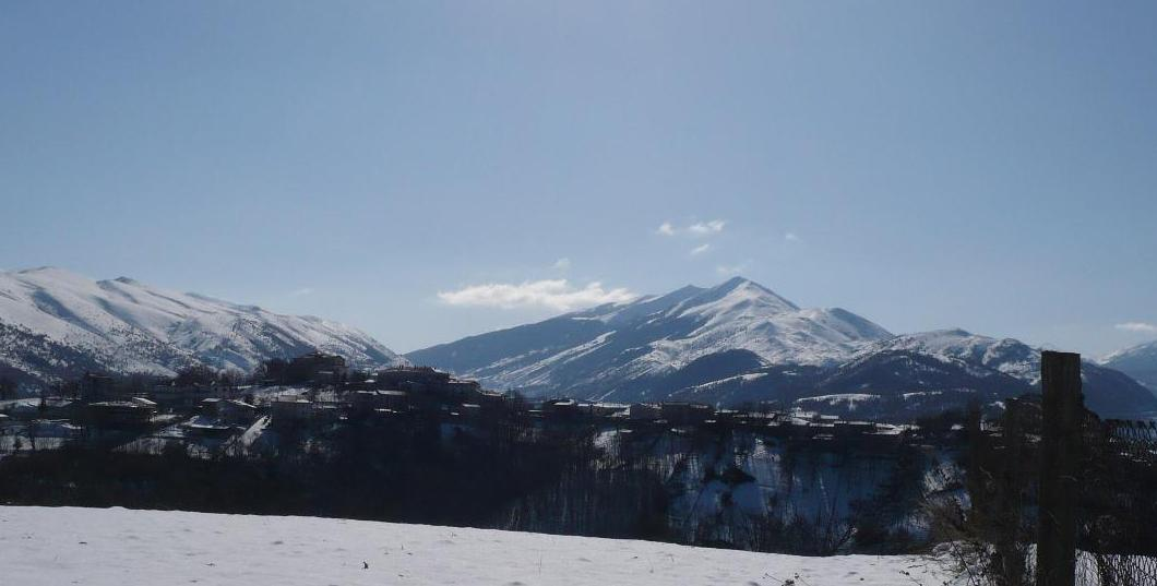 Landscape